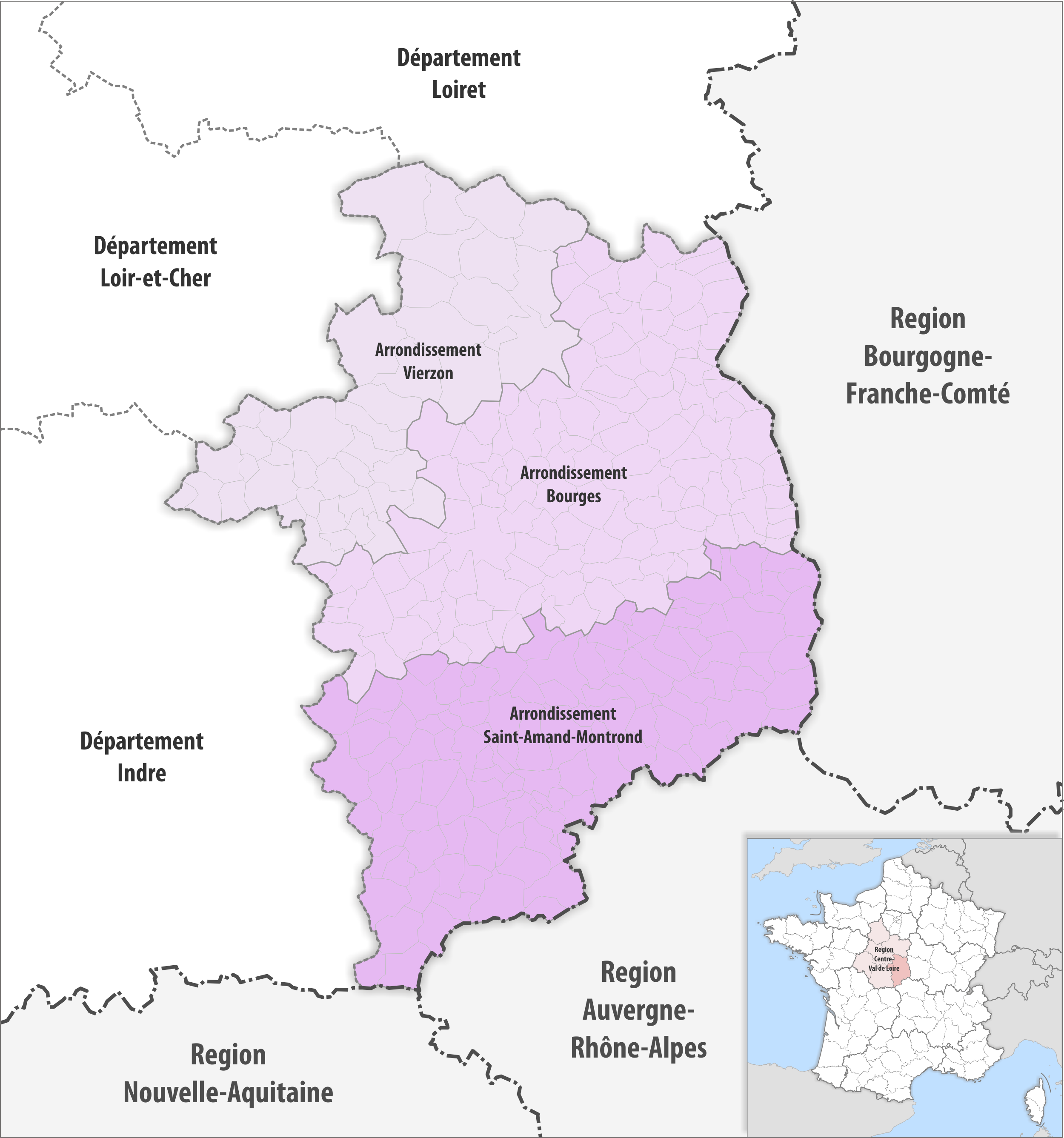 Gemeinden und Arrondissemente im Departement Cher